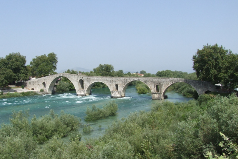 Die historische Brücke in Arta